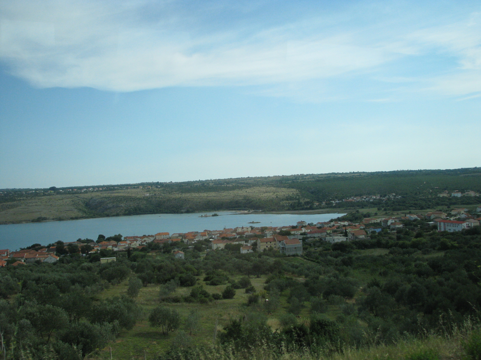 Posedarje